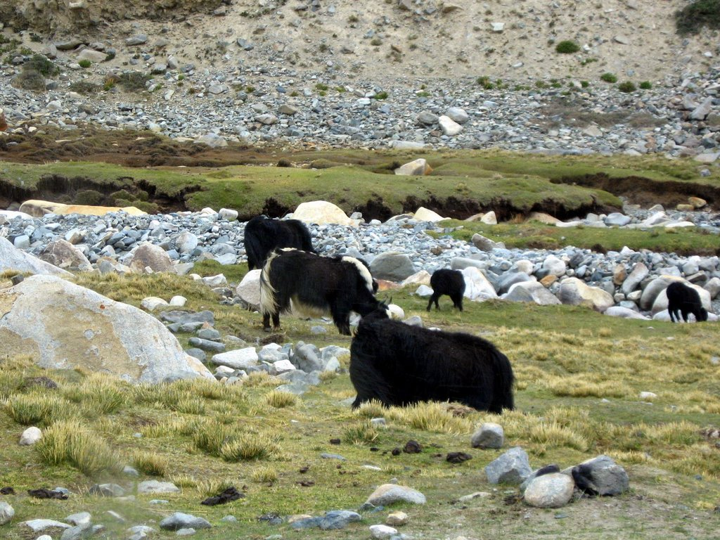 Yaks in Ladakh